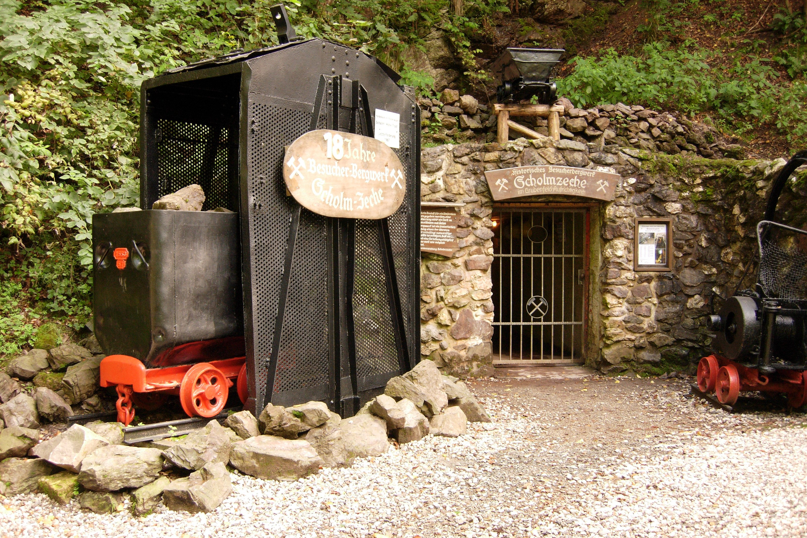 Eingang zur Scholmzeche am Kurpark von Bad Lauterberg